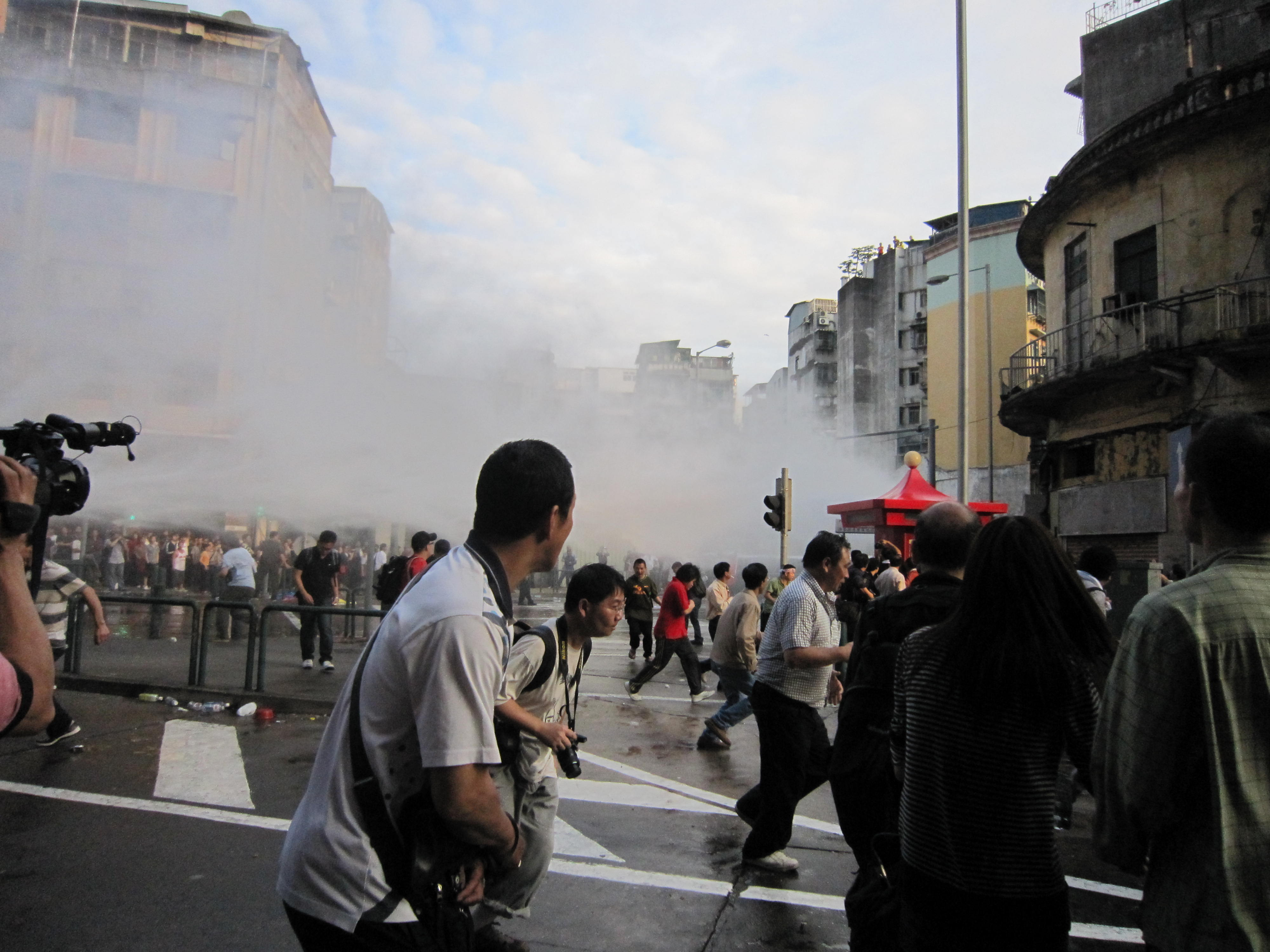 Procissão em Macau em 1 de Maio de 2010